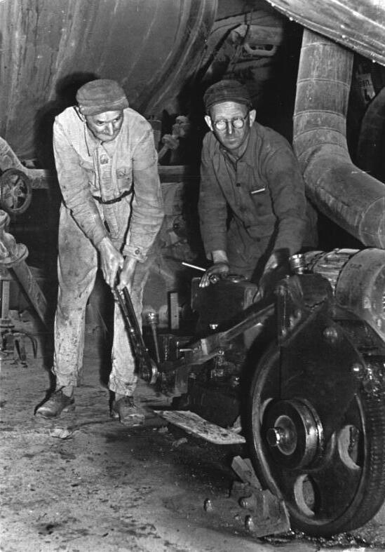 Industriearbeiter Maschine bedienend Zentralbild Illner Str.-Kr. 28.5.52. Kombinat Böhlen-Siegerbetrieb im Wettbewerb des 1. Quartals 1952. Dieser Erfolg wurde erreicht durch eine Verstärkung der Wettbewerbsbewegung innerhalb des Betriebes, bei der die Brigaden "Selbmann" und "Stachanow" aus dem Großgaswerk als "Brigaden der besten Qualität" ausgezeichnet wurden. UBz: Brigade "Stachanow". -Durch schulung der Maschinisten wurde erreicht, daß sie bei Störungen das Rohgas- oder des Wasserzuflusses ihre Anlage selbstständig stilllegen können, um den Ausstoß von Reingas in gleichbleibender Güte zu gewährleisten.- Brigadeleiter Ferdinand Krumbmann behebt mit dem Maschinisten Karl Runger eine Störung am Ascheaustritt an einem der Generatoren in der Gaserzeugung.